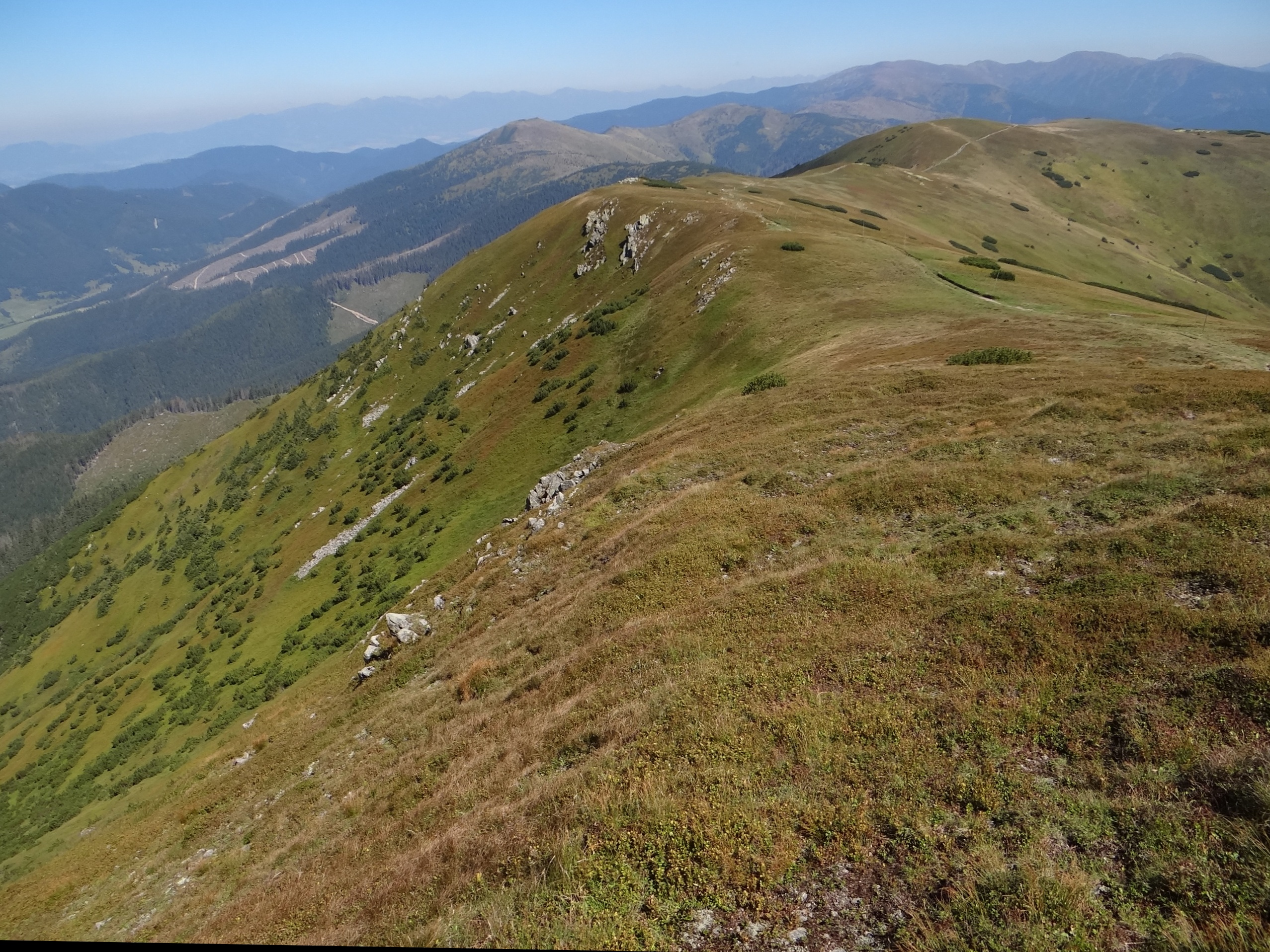 Košarisko (1695 m). View from Veľká Chochuľa